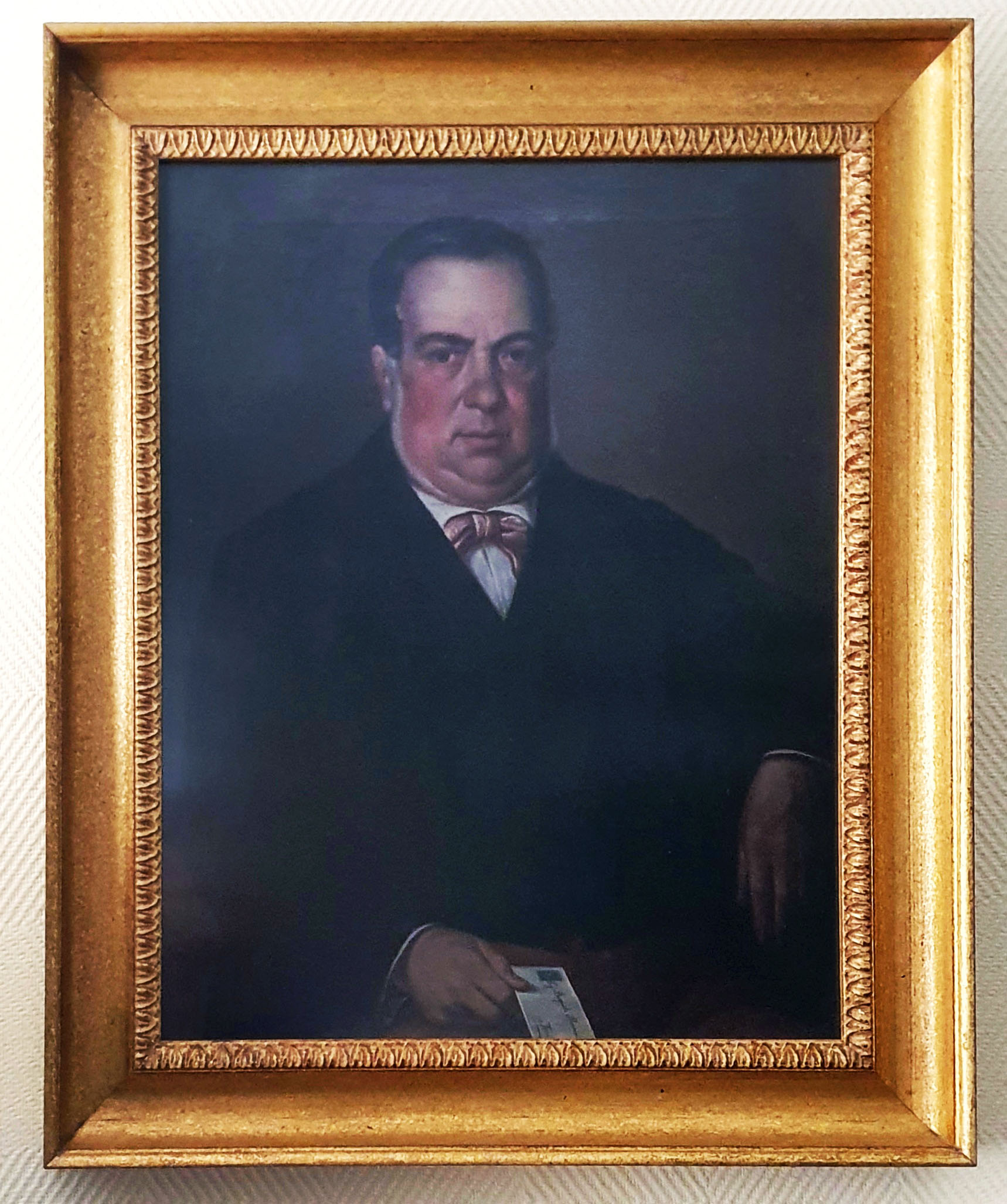 Ritratto di Pasquale Mormino Navarra, metà XIX sec., collezione privata